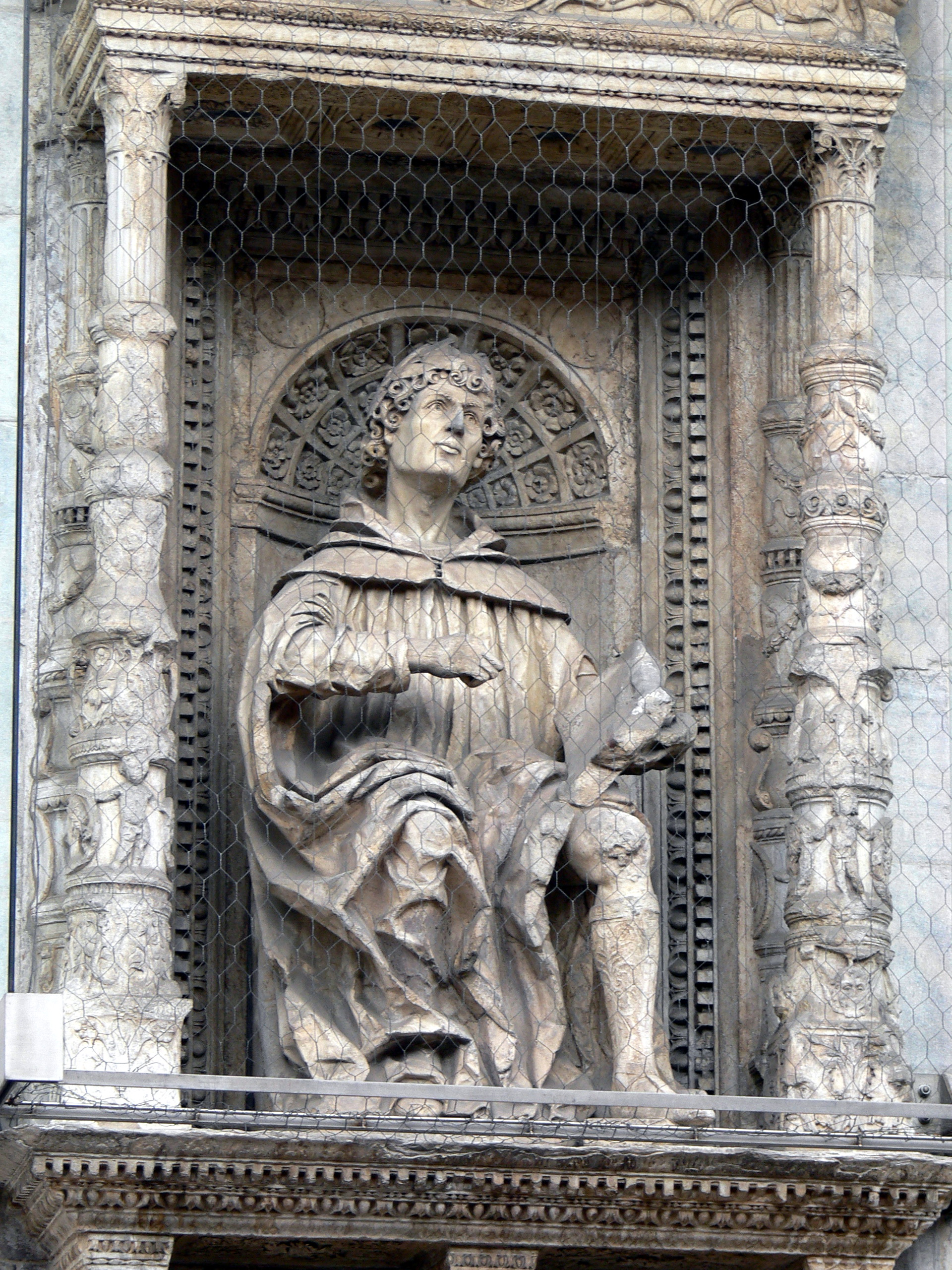 Dom S.Maria Maggiore in Como. Fassade: Statue Plinius der Ältere von Tommaso und Jacobo Rodari